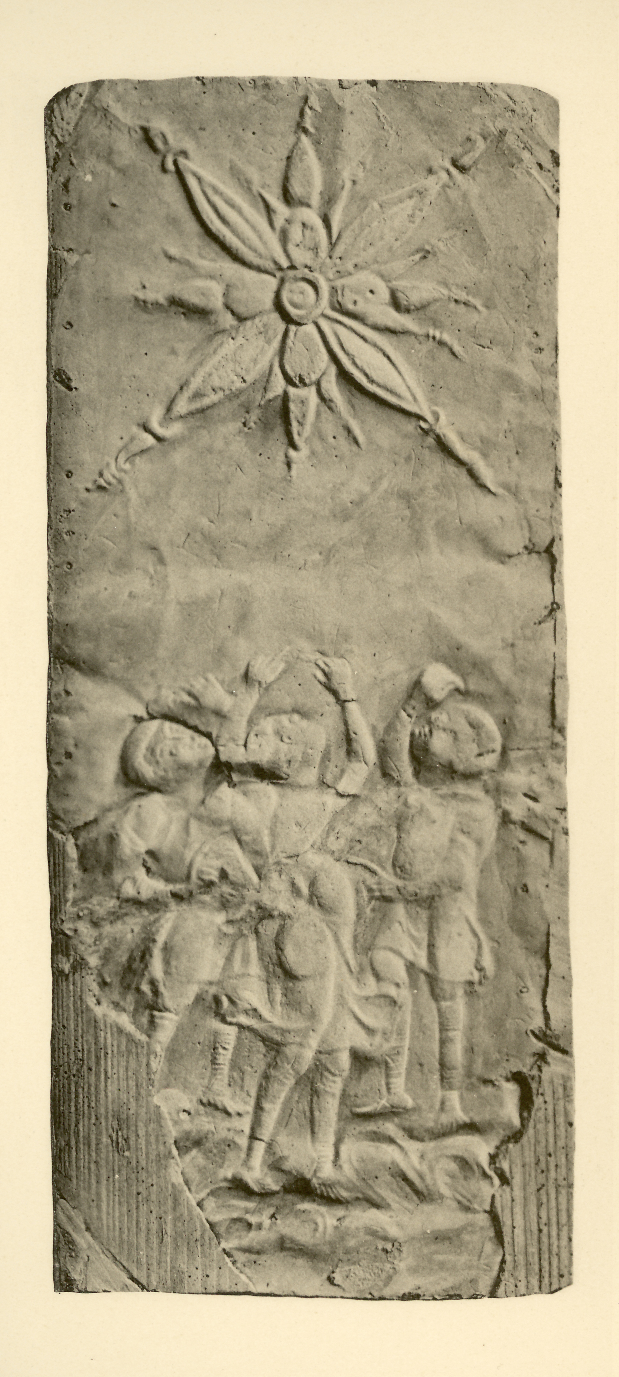 Gipsabdruck eines Fragments einer Treibarbeit aus dem 10. Jh. Die Drei Magier erblicken den Stern von Bethlehem. Fragment verschollen, Abdruck ebenfalls verschollen